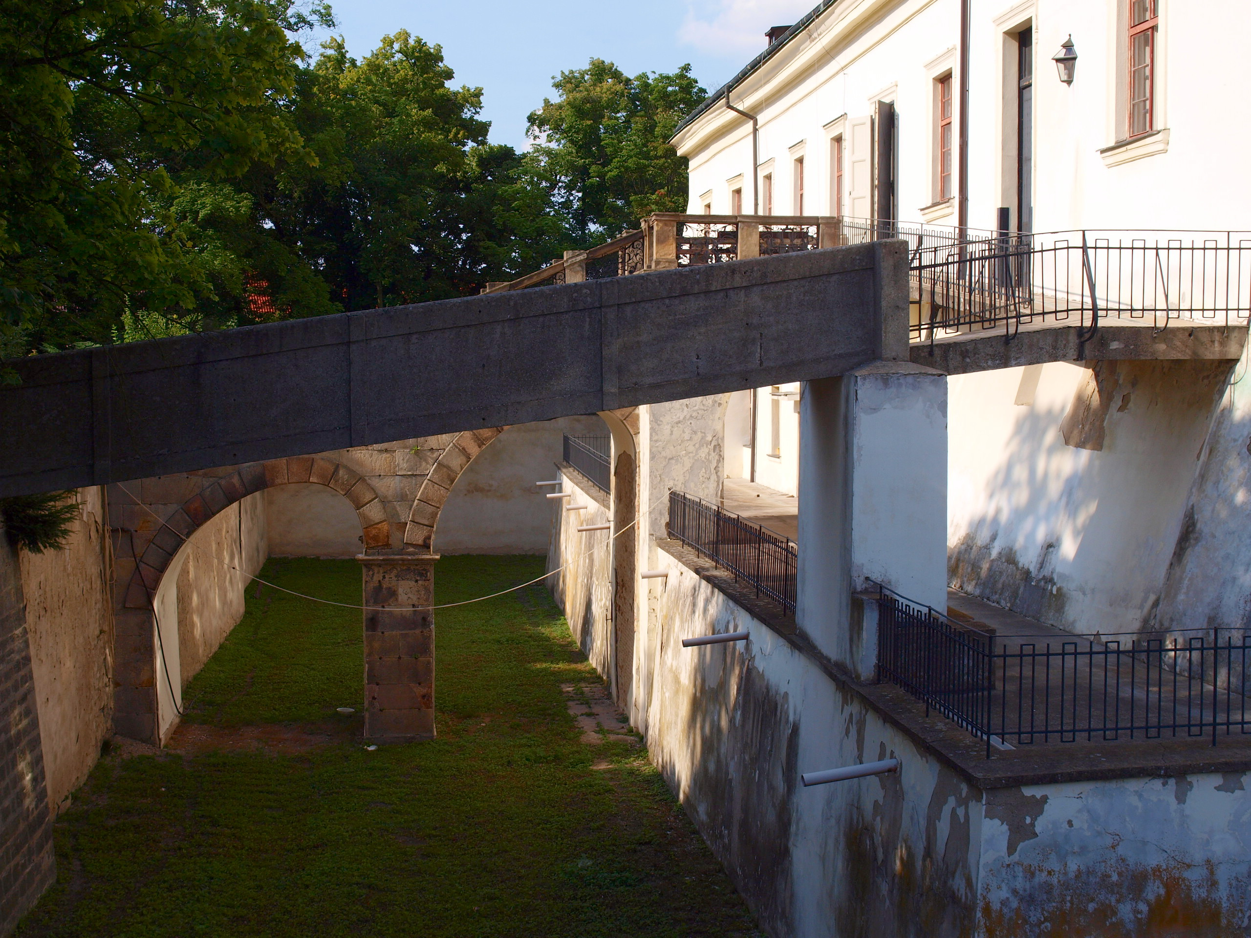 Zámek Smečno